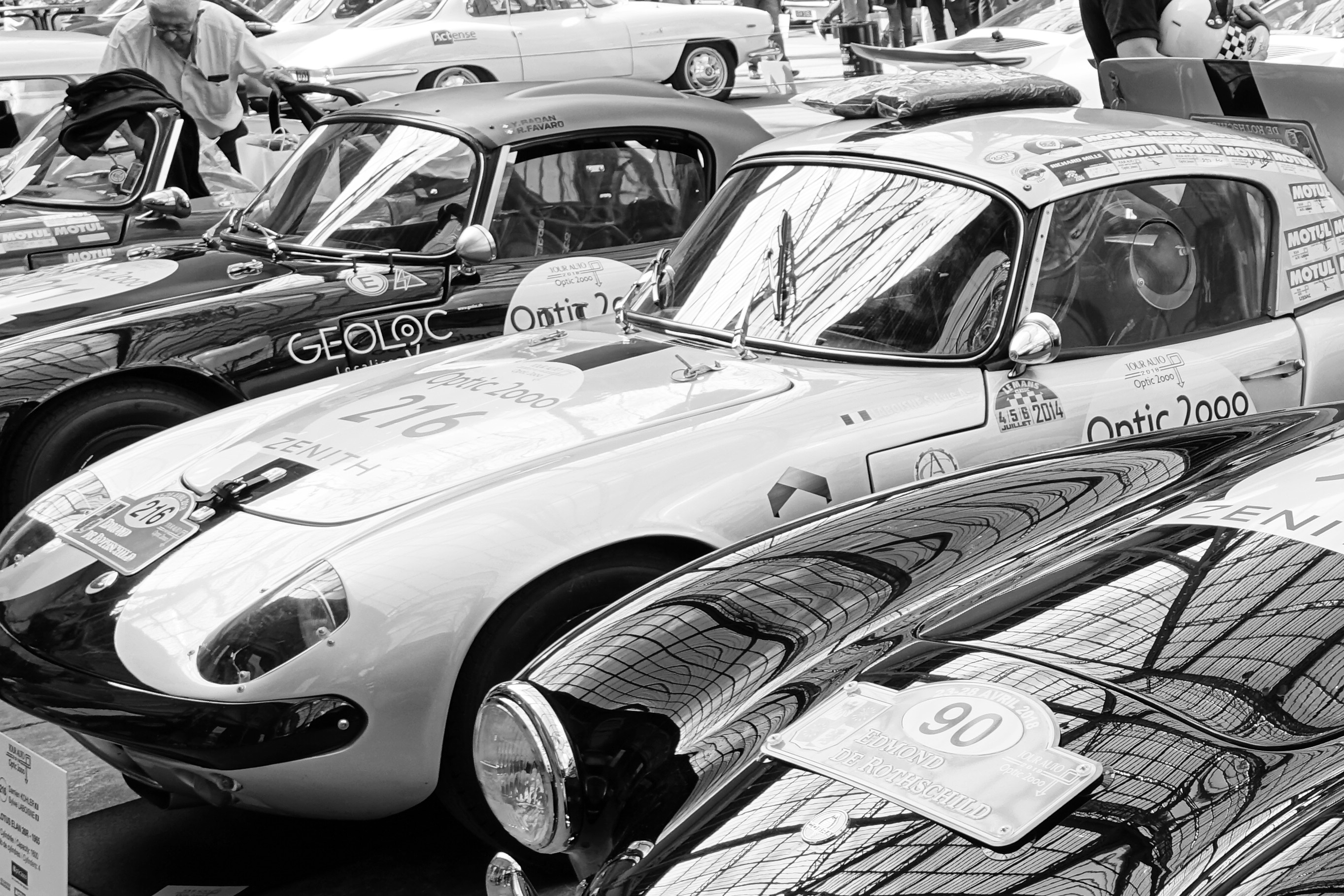 Lotus Elan 26R n°216 et 211- Grand Palais